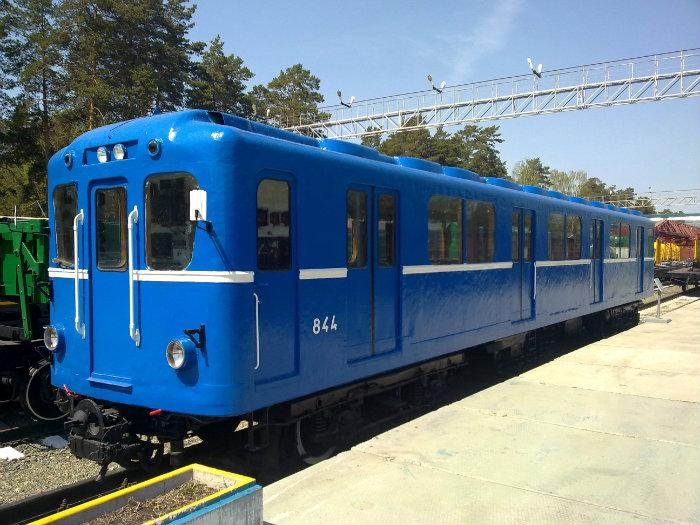 Вагон метро типа Д № 844. Вид спереди